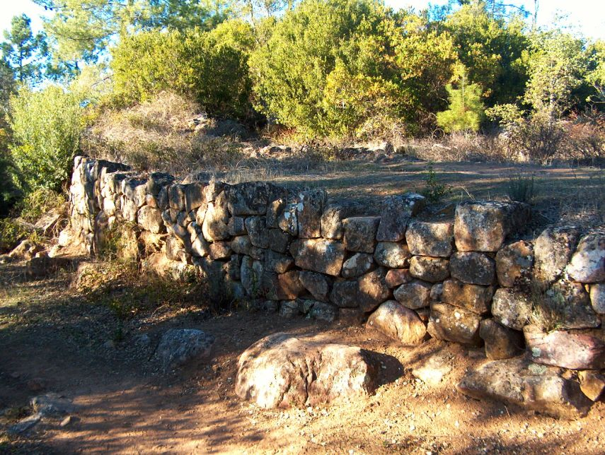 Muralha do Castelo de Giraldo, freguesia de Nossa Senhora de Guadalupe, Évora, Portugal